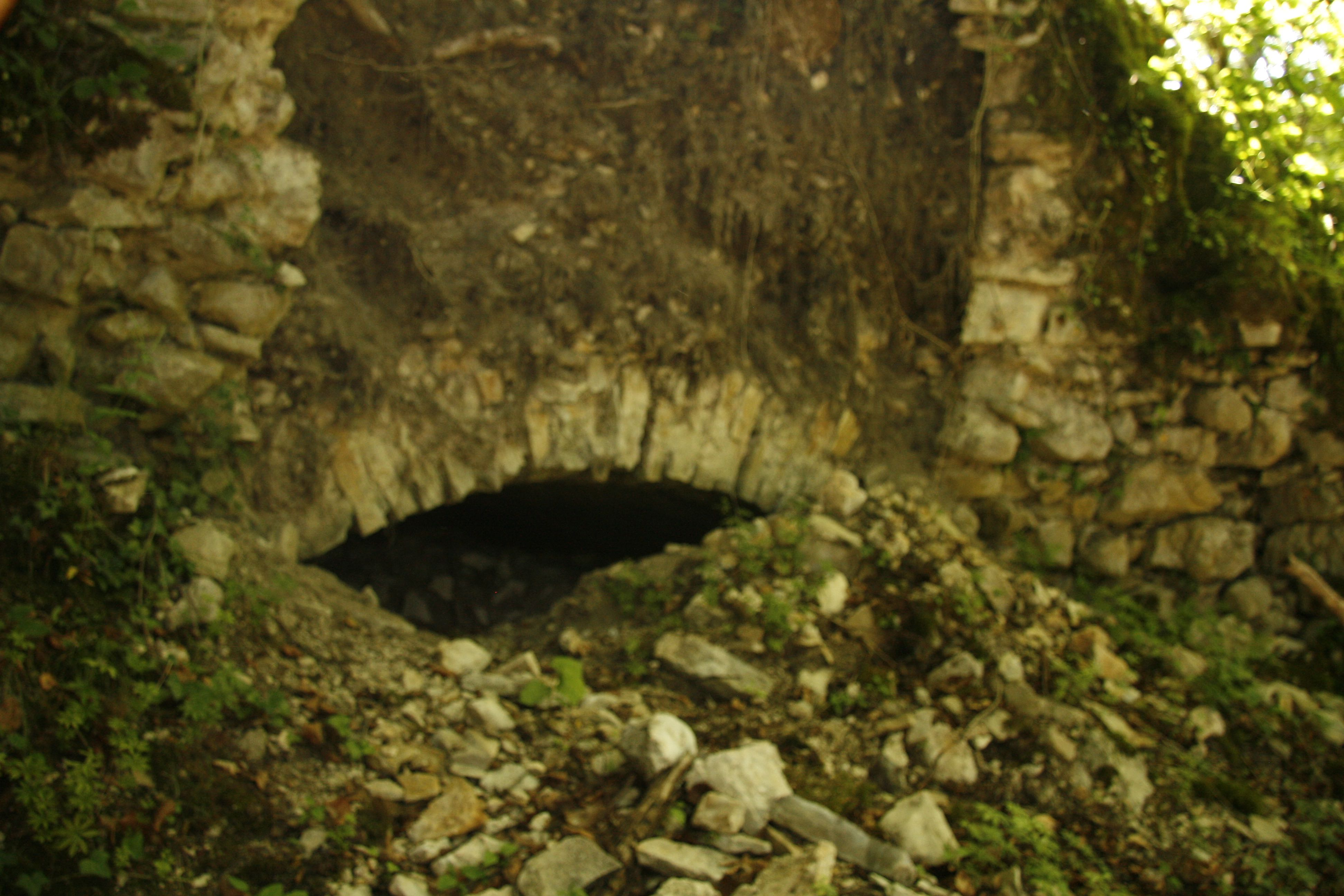 Excavation est chateau de Rougemont